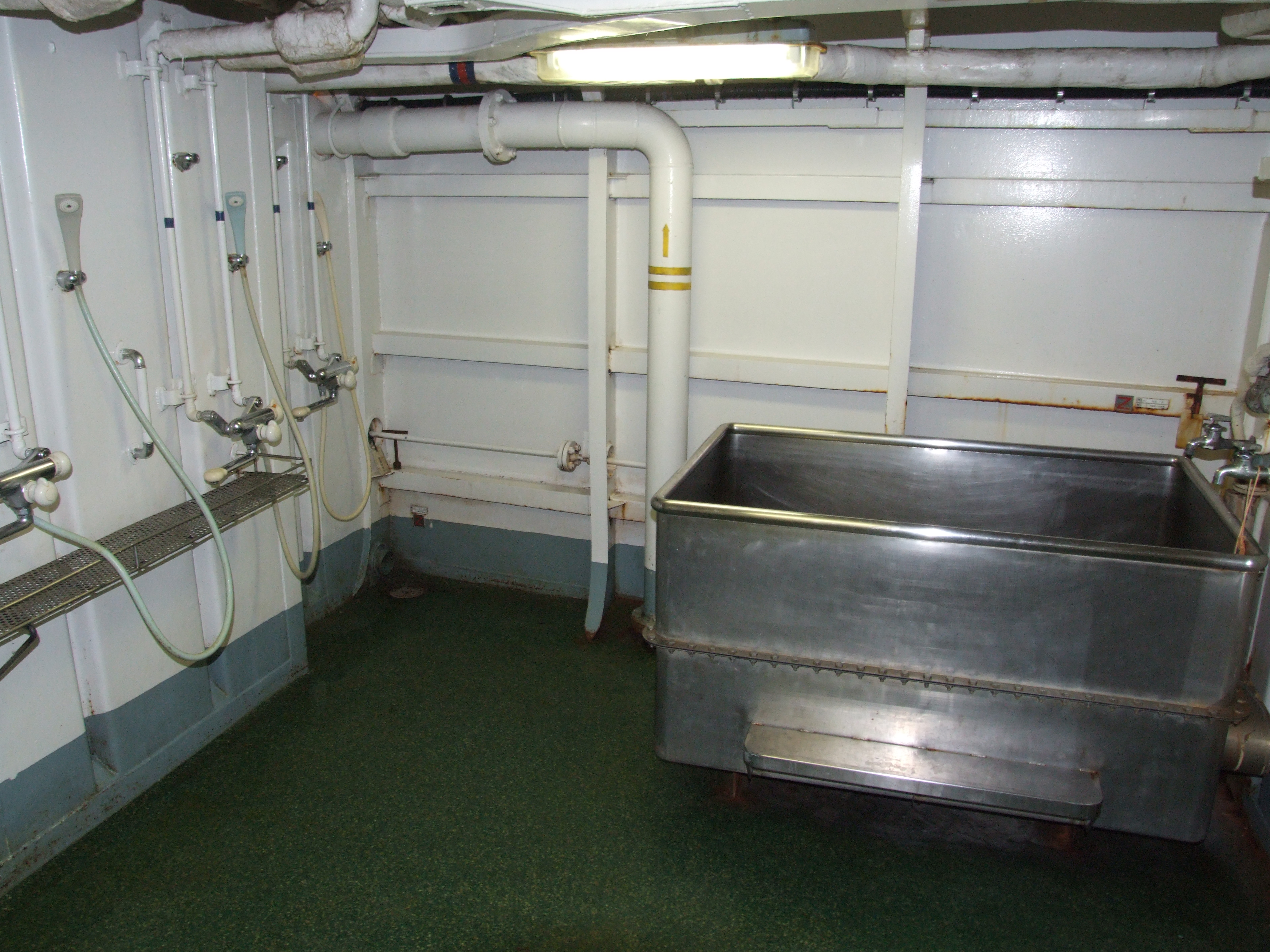 護衛艦しらゆきの浴室。横浜港開港150年の艦内開放にて撮影。